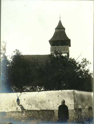 Adler - Biserica greco-catolică din Tuştea mare, jud. Hunedoara